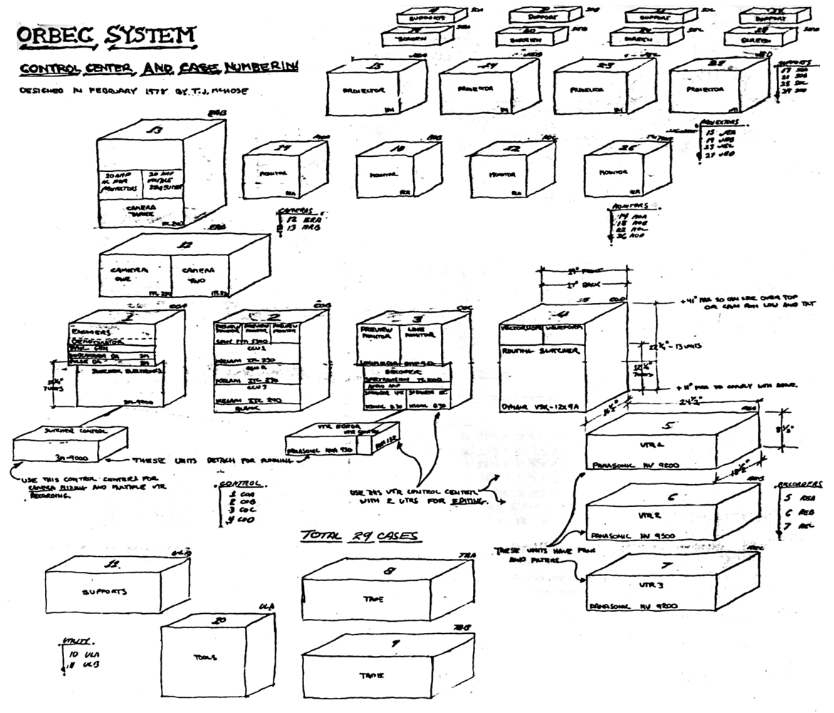 Schéma balenia Tour